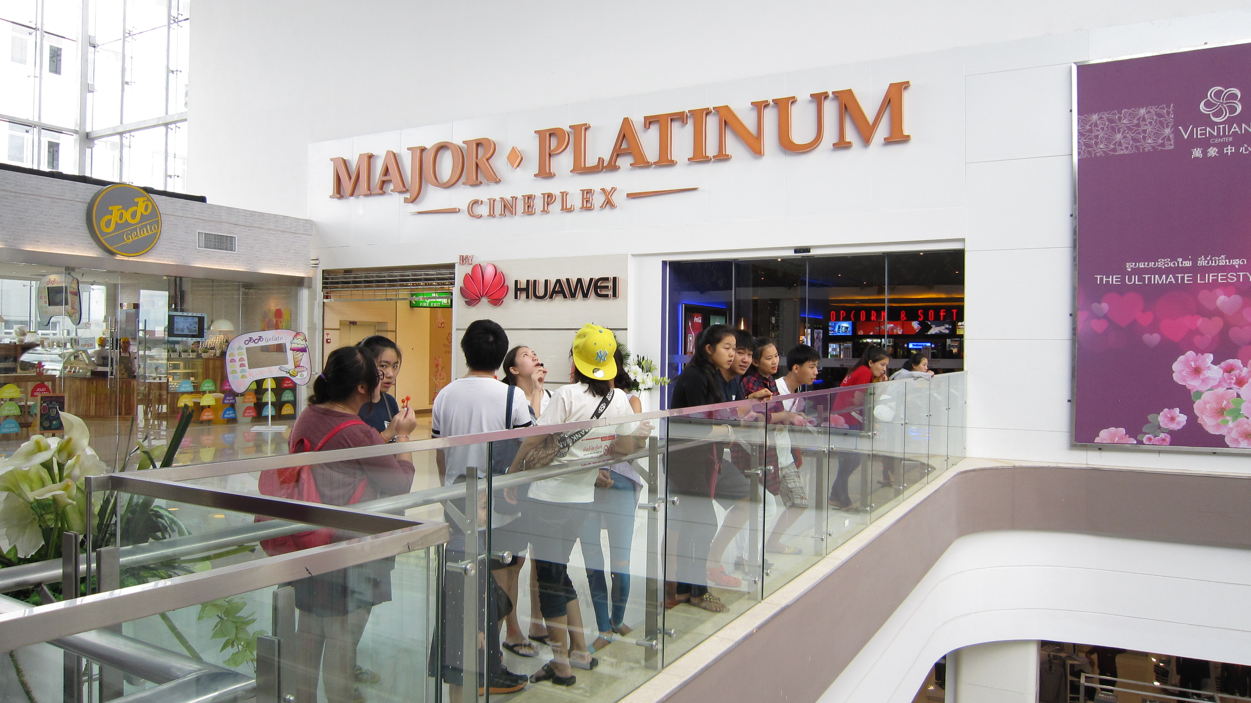 映画館です。